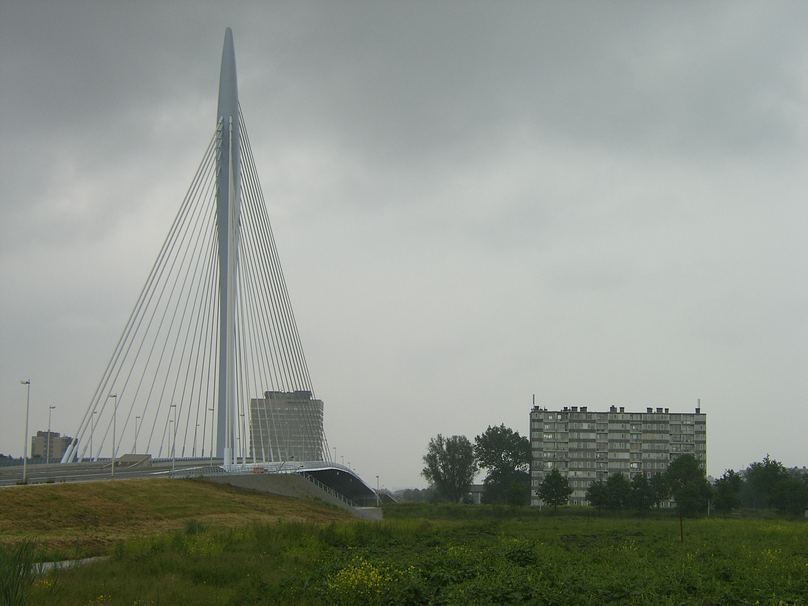 eigenwerk Ruben Alexander